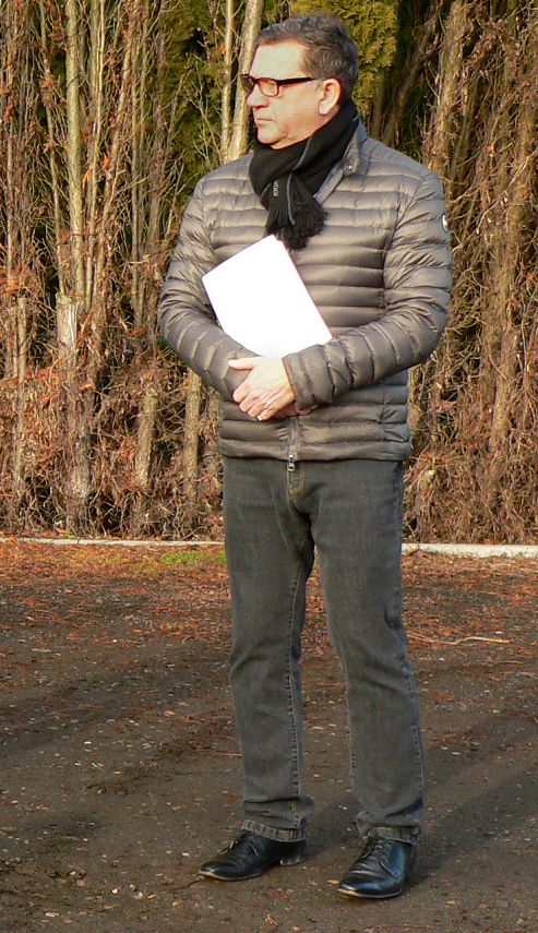 Pressetermin am Römischen Marschlager Wilkenburg, u.a mit dem Bürgermeister der Stadt Hemmingen Claus-Dieter Schacht Gaida.